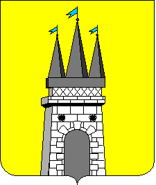 Герб Лохвиці періоду Російської імперії